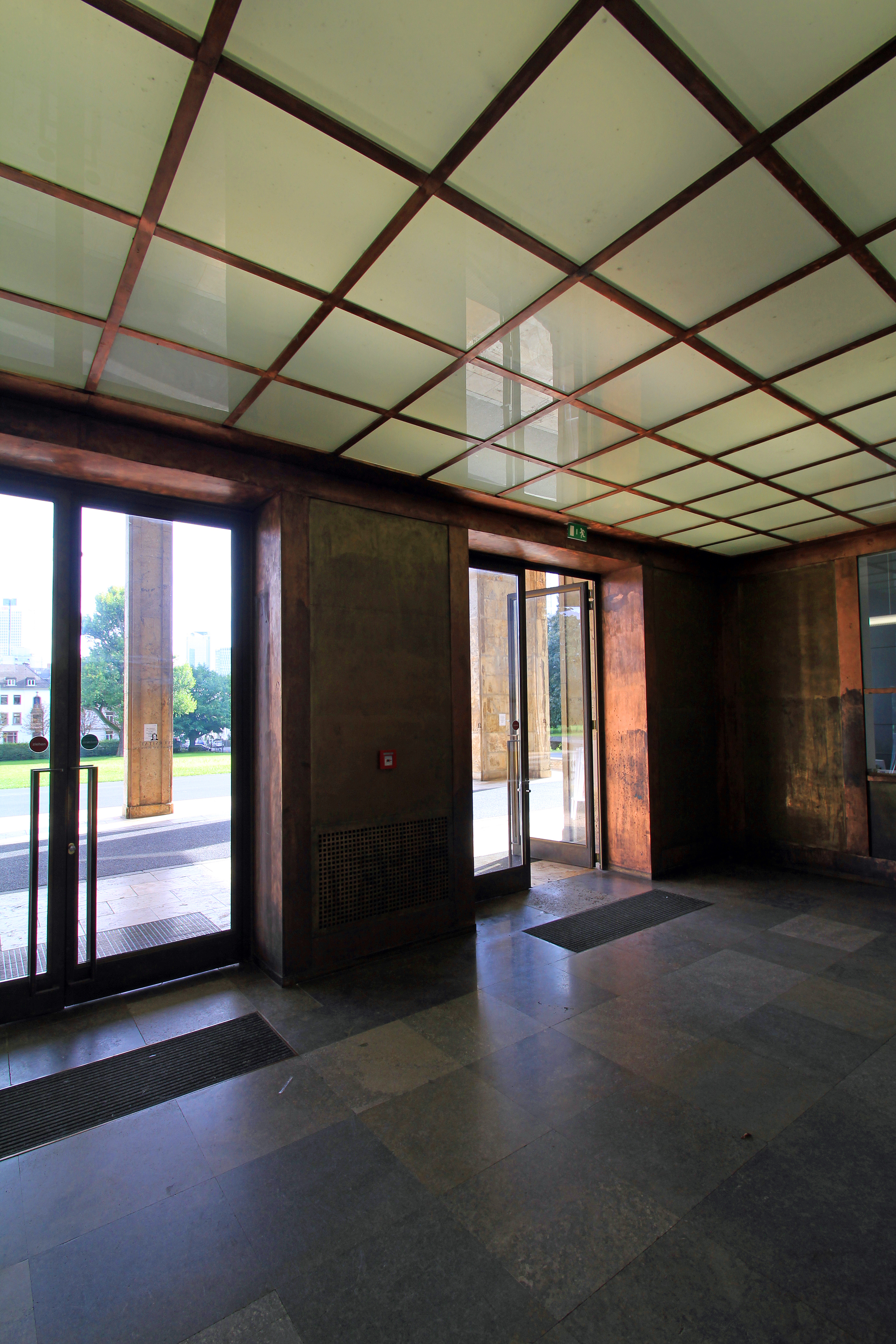 Eingangsbereich des IG-Farben-Hauses in Frankfurt. Mit Kupfer ausgekleideter Windfang mit Pförtnerloge